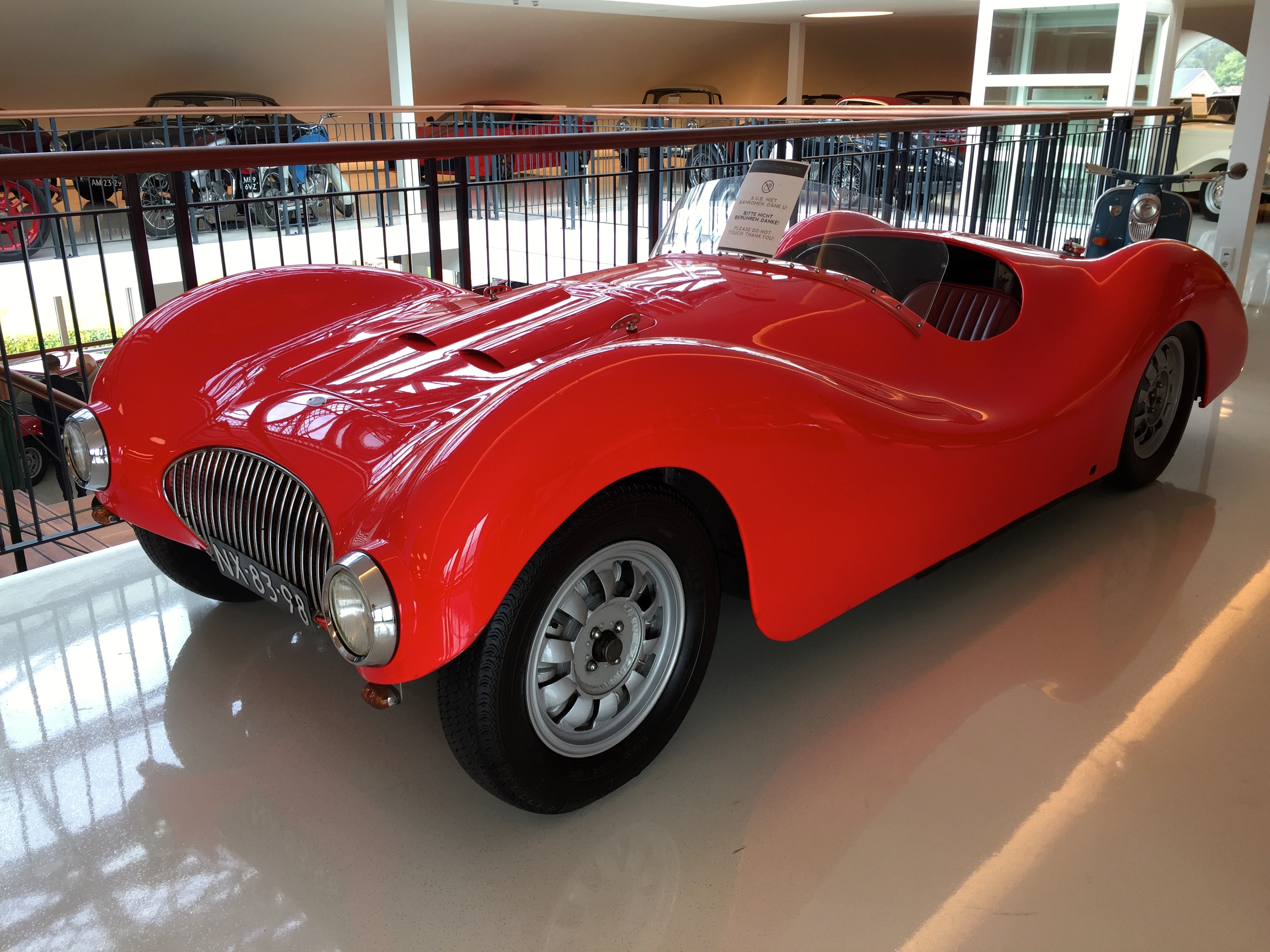 De Nederlander Maus Gatsonides heeft 2 modellen van de Gatso gebouwd, de Gatso 400 en de Gatso 1500. Van de 400 bestaat waarschijnlijk geen enkele exemplaar meer. Met de Gatso 1500 is hij echter nooit verder gekomen dan één prototype, bijgenaamd 'Platje' (1949). Die naam slaat op de zeer laag gebouwde carrosserie, getekend door Jan Apetz. In Platje is een zescilinder 1500-motor van Fiat gebruikt. Gatsonides heeft Platje zelf voor enkele wedstrijden en een recordpoging gebruikt. Platje is het enige exemplaar van het merk Gatso dat nog bestaat, Maus Gatsonides werd later bekend bij het grote publiek door zijn flitspalen en radarsystemen voor snelheidsmetingen.